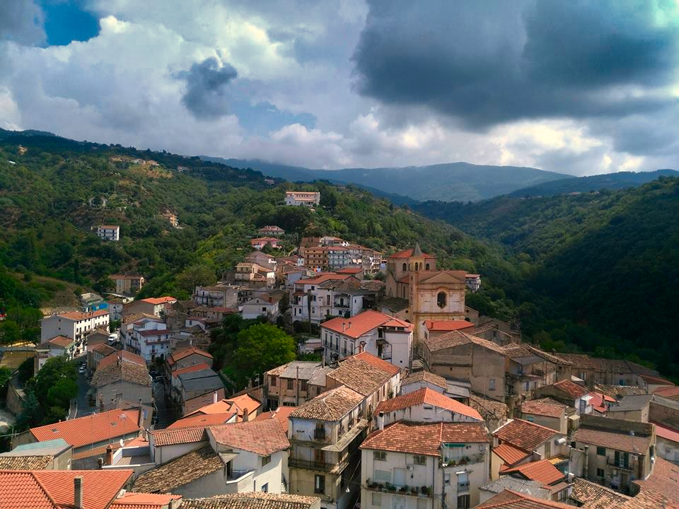 Vista di parte del centro storico di Luzzi dal campanile di San Giuseppe.